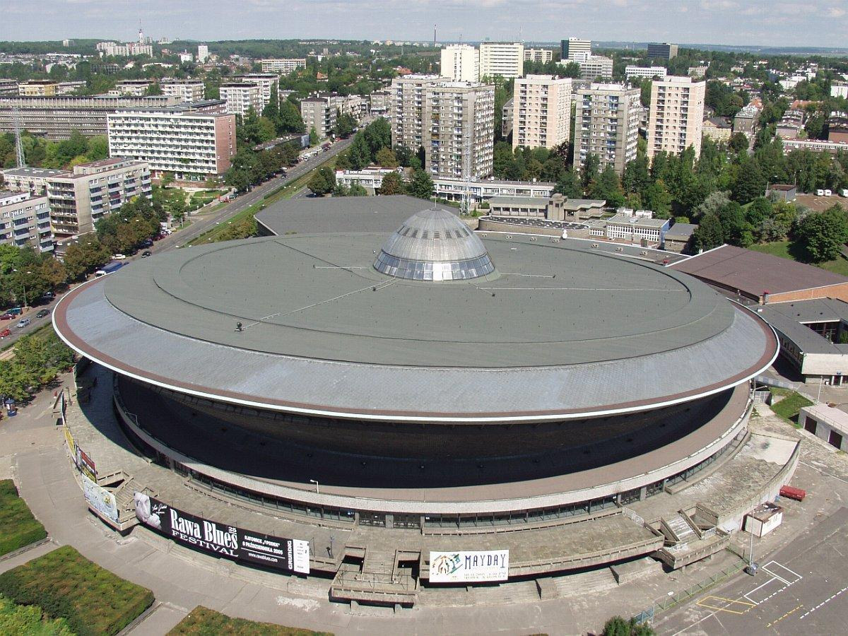 Katowickie ufo z lotu ptaka. Zbiór użyczony przez Urząd Miasta Katowice